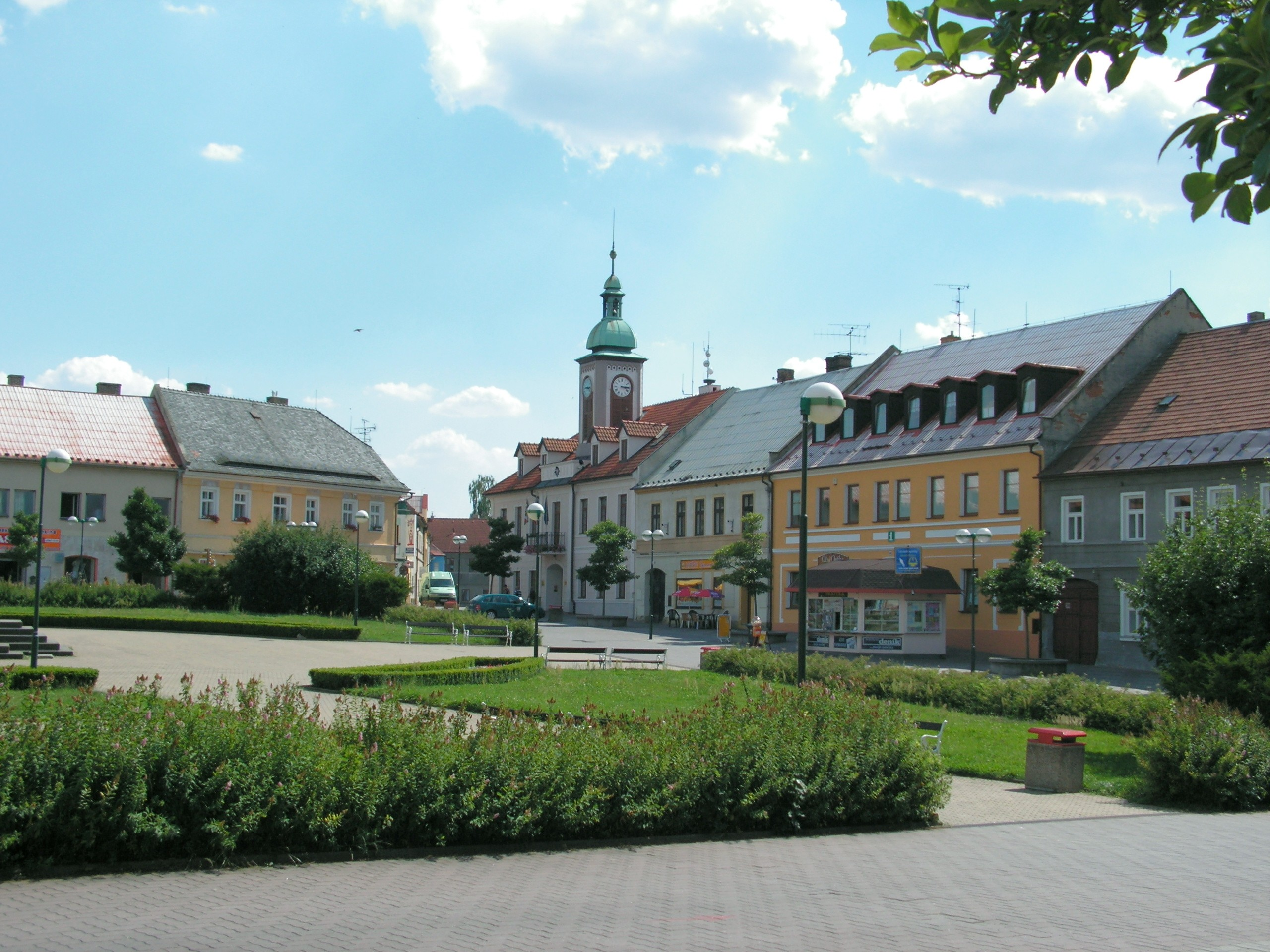 Pohled na náměstí v Doksech.